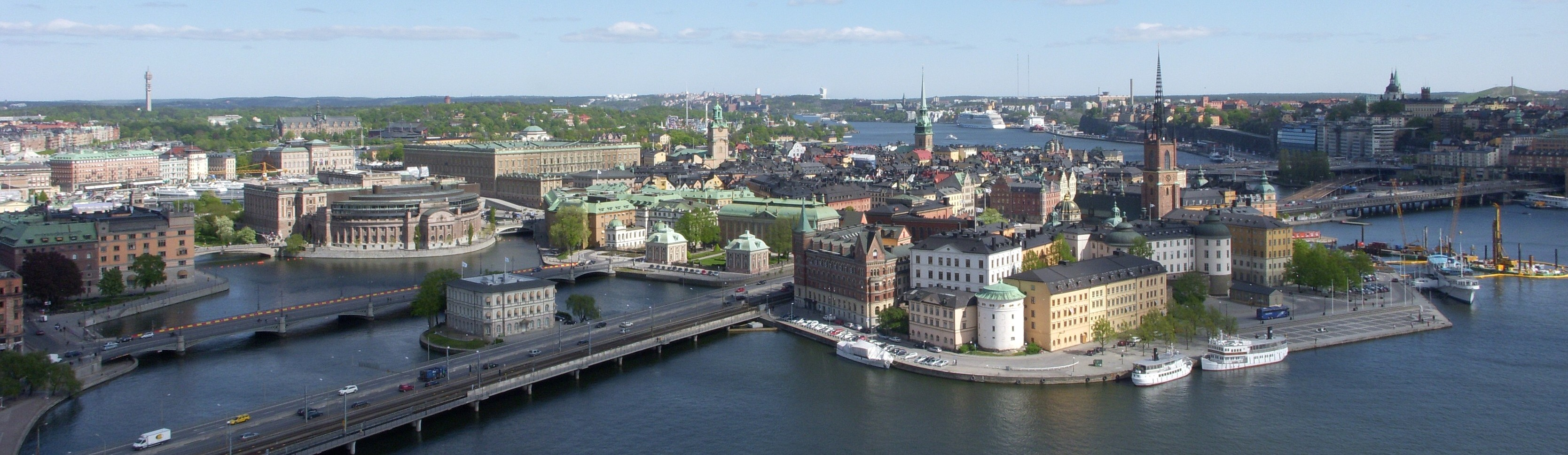 Panorama från Stadshustornet över Gamla stan och Riddarholmen